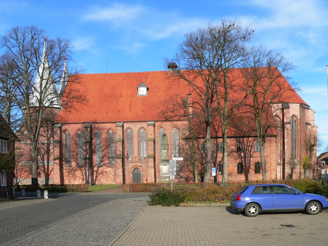 Dom zu Bardowik, südliche Fassade